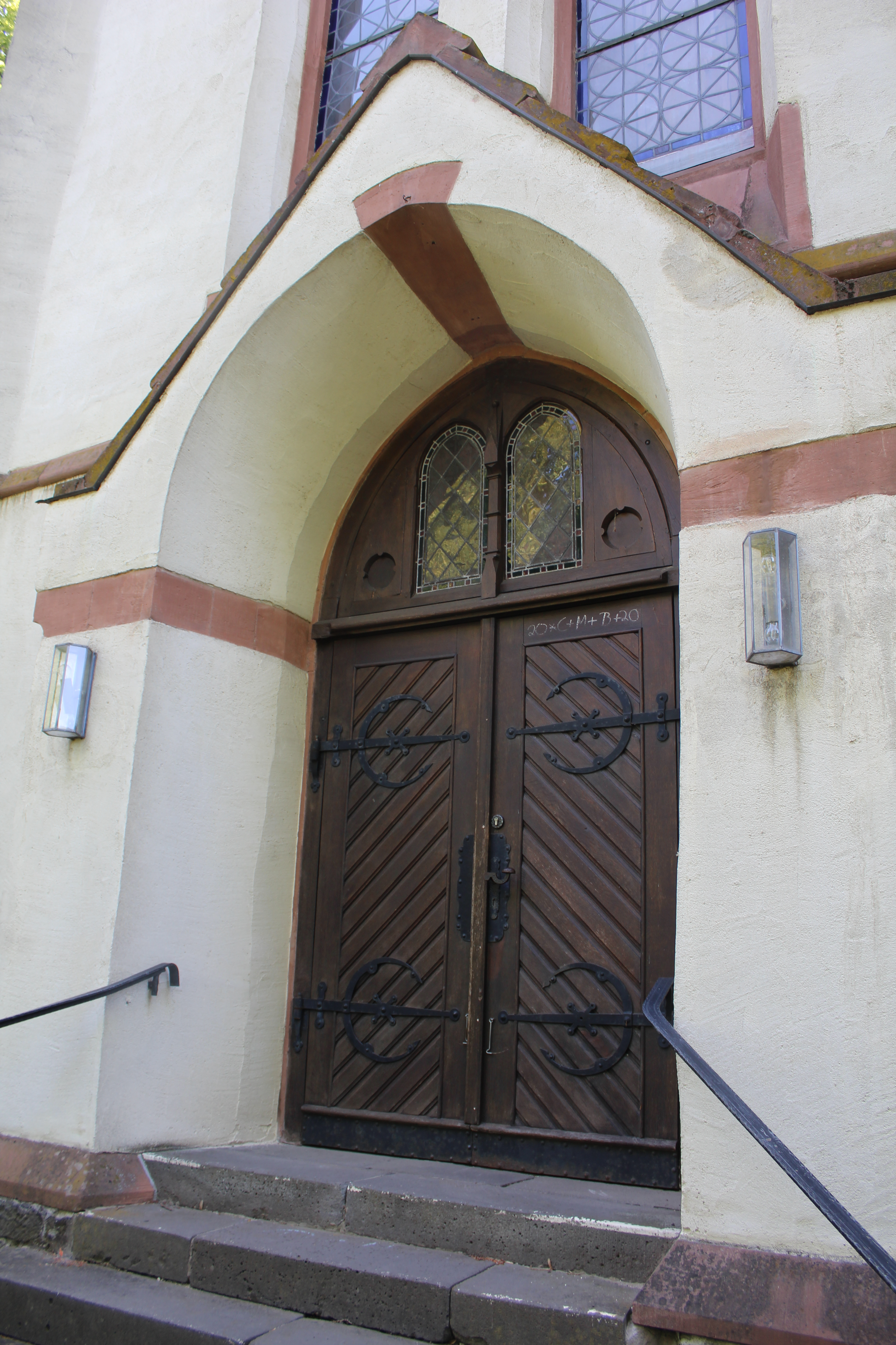 Evangelische Kirche Burgsolms, Solms, Lahn-Dill-Kreis, Hessen, Deutschland